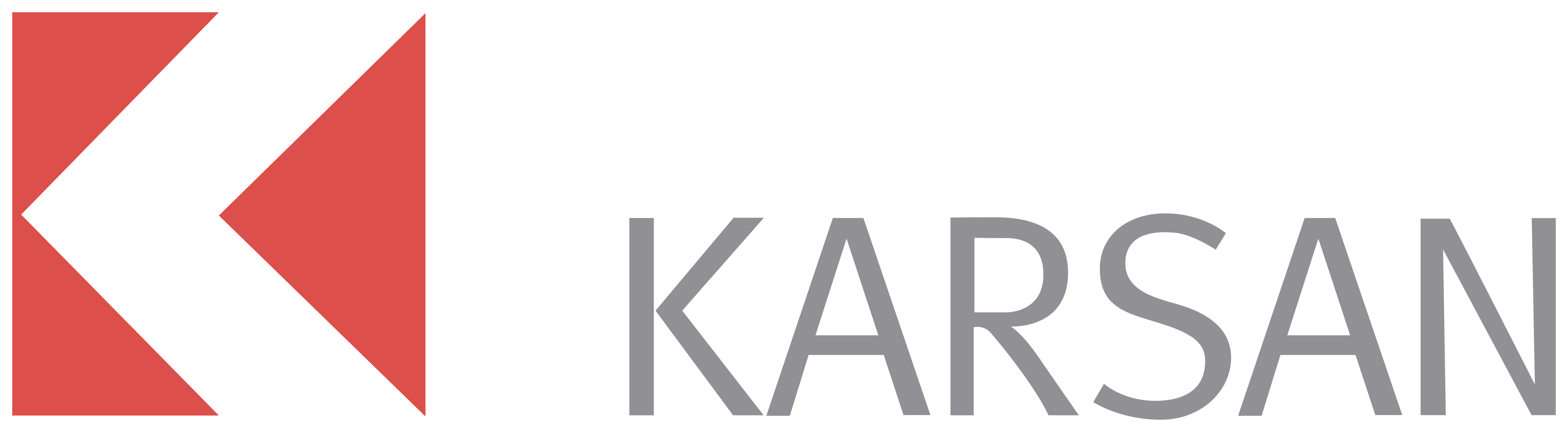 Karsan markasının logosu.